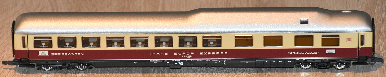 Voiture-restaurant Rheingold 1962 WRümh131 61 80 88-80 004-9 à l'échelle HO, dans un coffret vendu par Roco sous la référence 45924